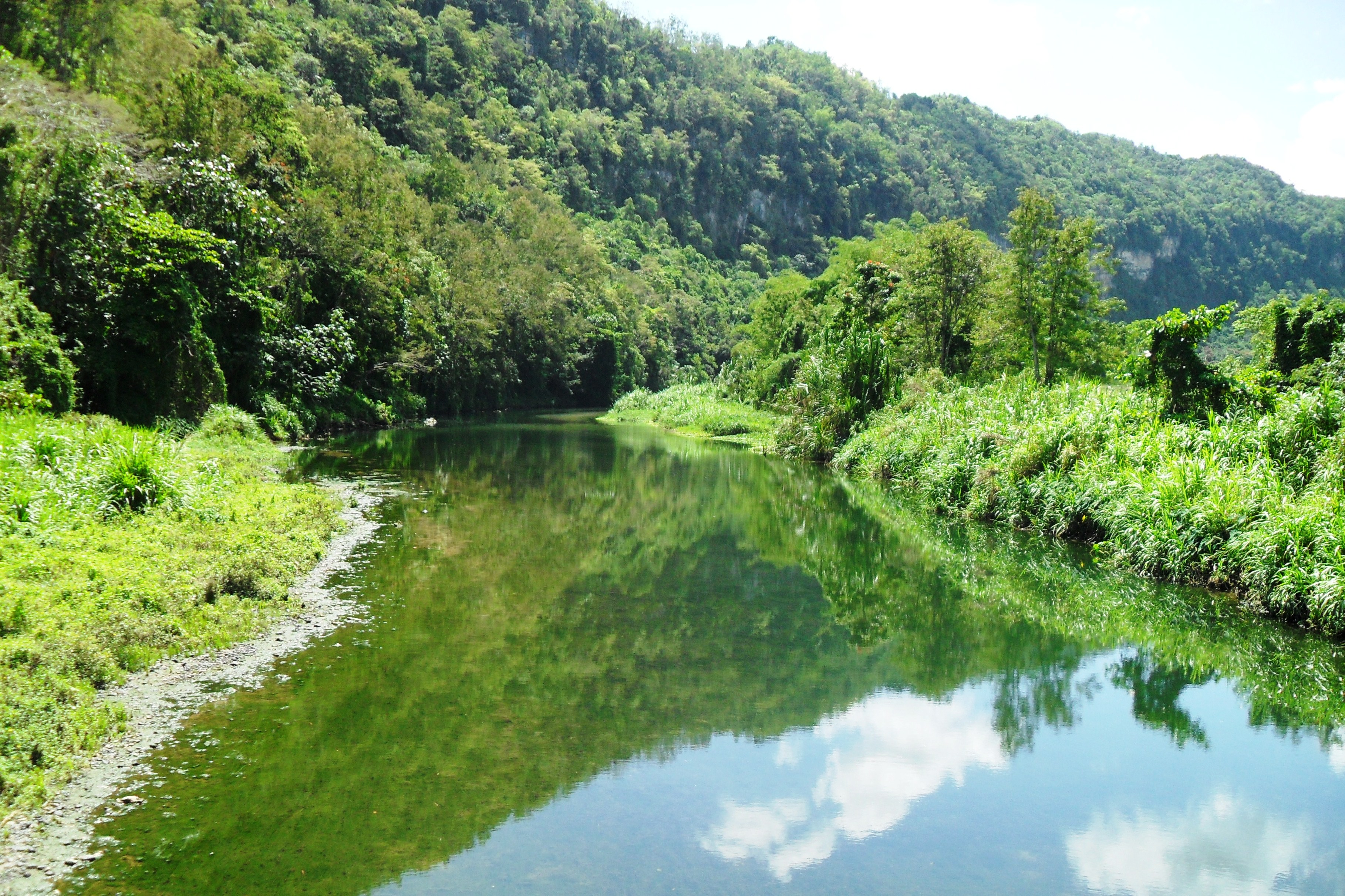 Reflejos de montaña sobre el Rio Grande de Arecibo - Arecibo, Puerto Rico